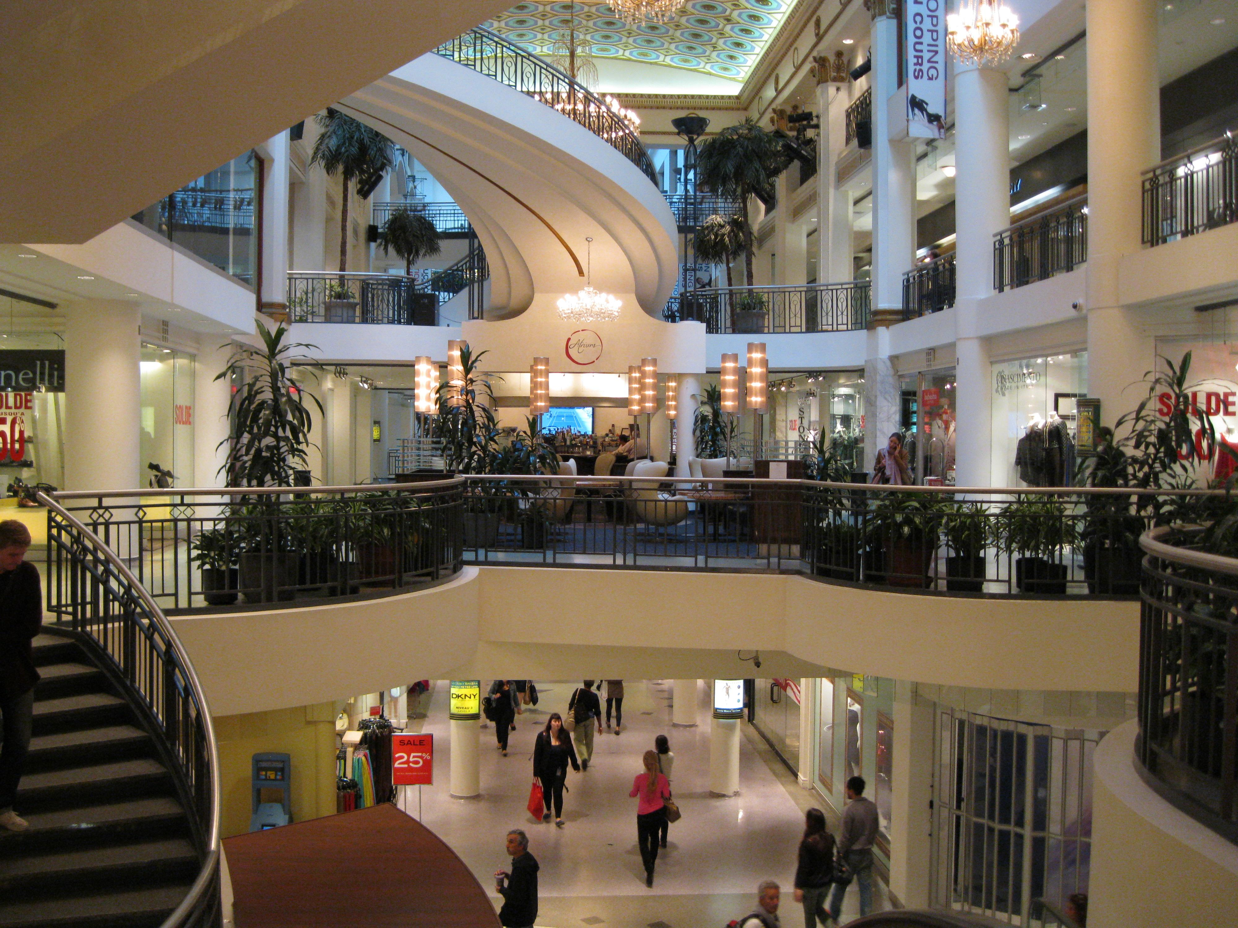 Cours Mont-Royal